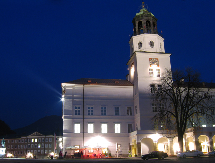 Neue Residenz (Salzburg)